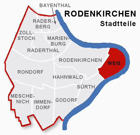 Lage des Stadtteils Weiß im Stadtbezik Rodenkirchen